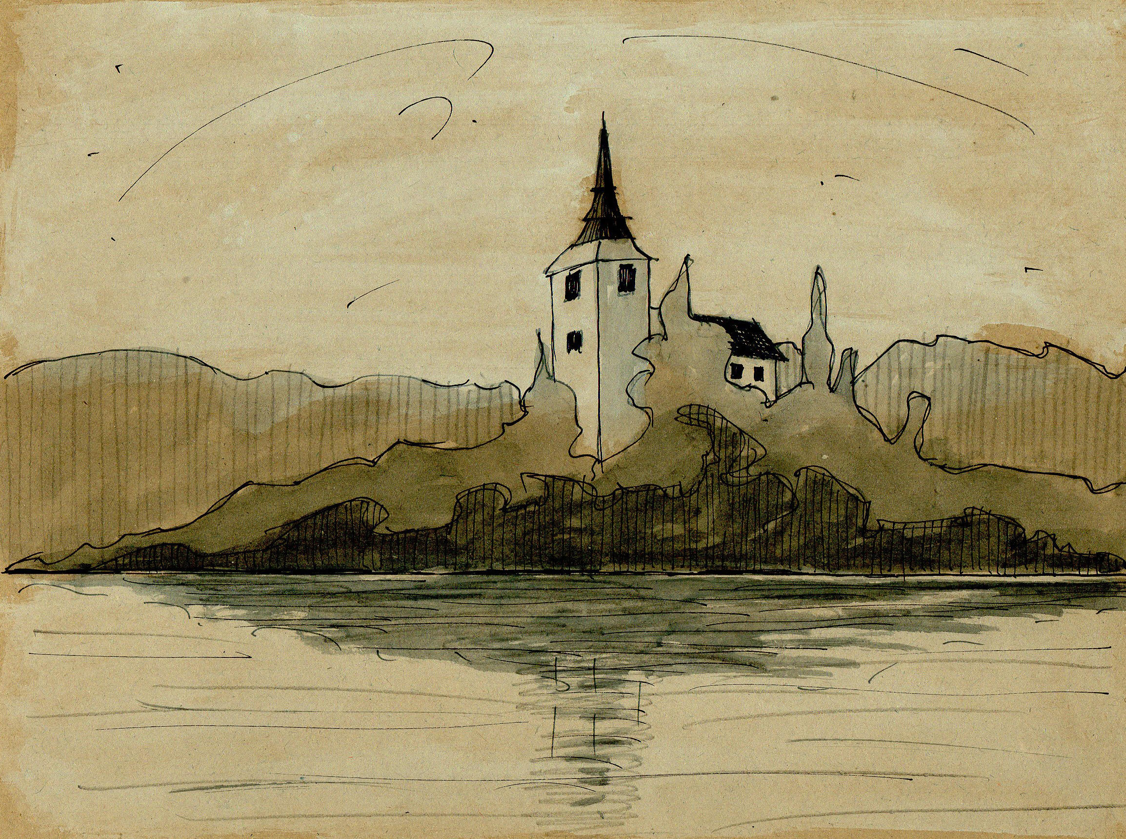 Skizze Bled in Slowenien, 2018, Gouache, Aquarell, Tusche